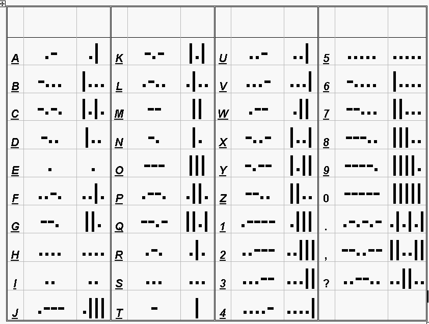 Морзеова азбука